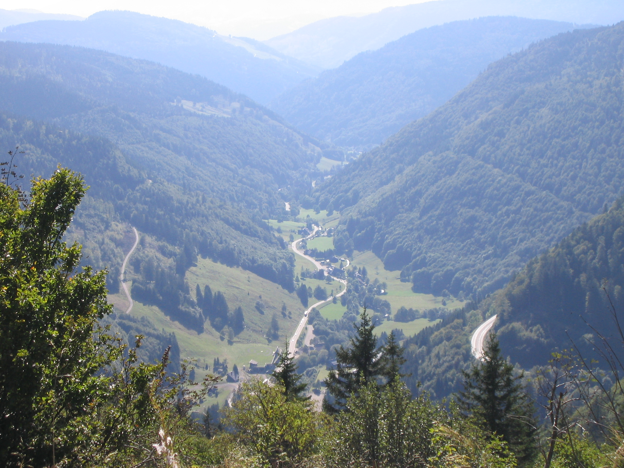 Blick vom Feldberg nach Brandenberg-Fahl (Todtnau)